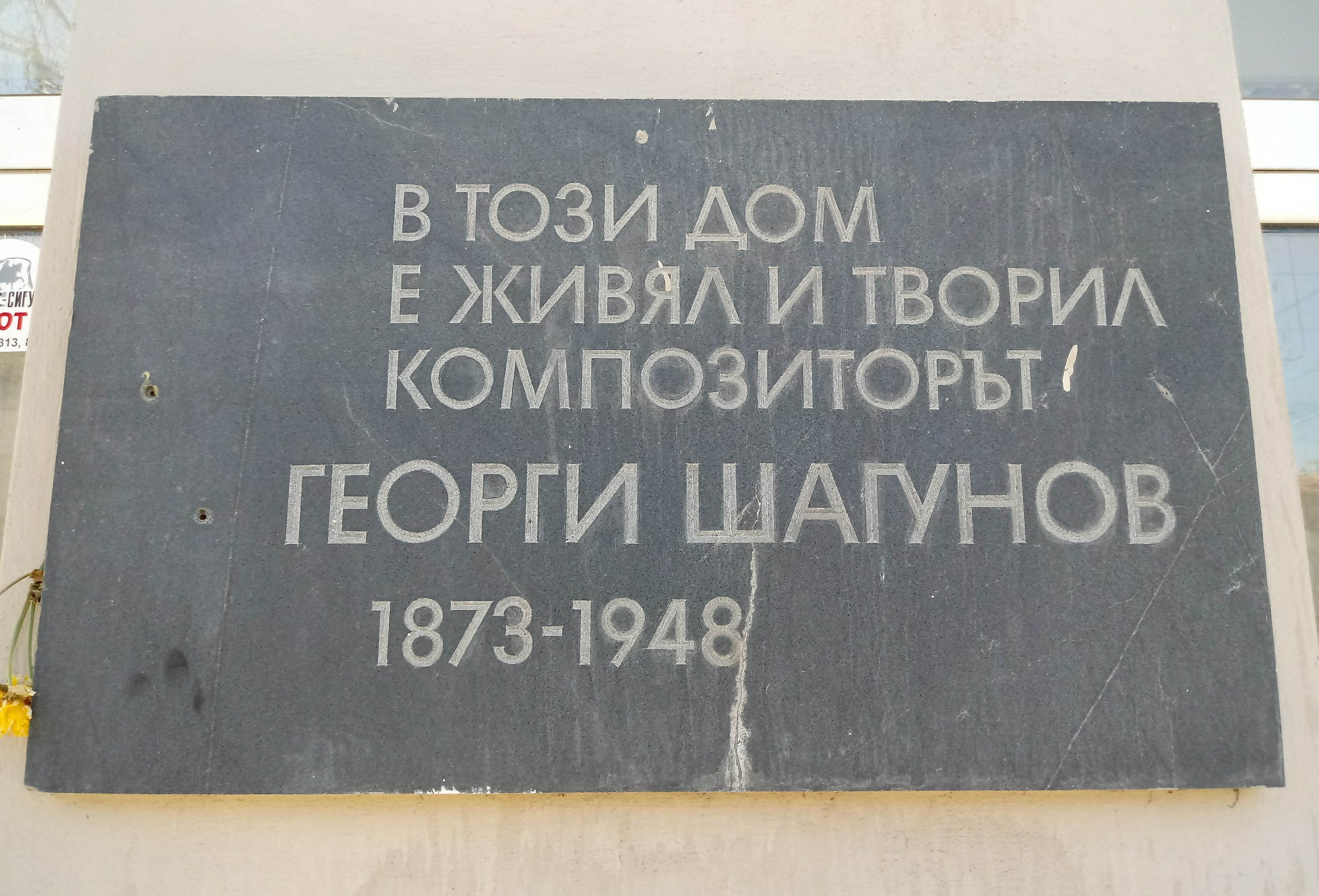 Georgi Shagunov memorial plaque, 2 Filip Kutev Str., Burgas